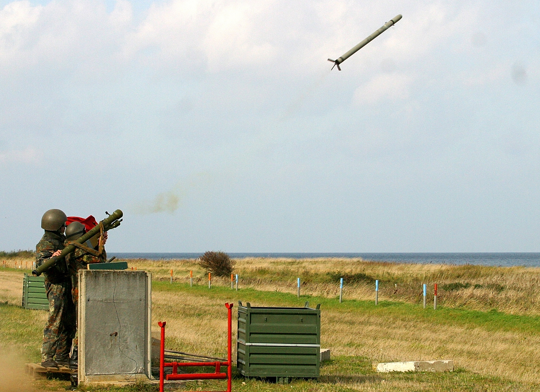 Reservisten schießen mit der Fliegerfaust STRELA. Die "Strela 2" wurden durch die Bundeswehr als Fliegerfaust 1 insbesondere zur Schießausbildung (Gewöhnungsschießen) nach dem Zerfall der DDR übernommen. ©Bundeswehr/Mandt